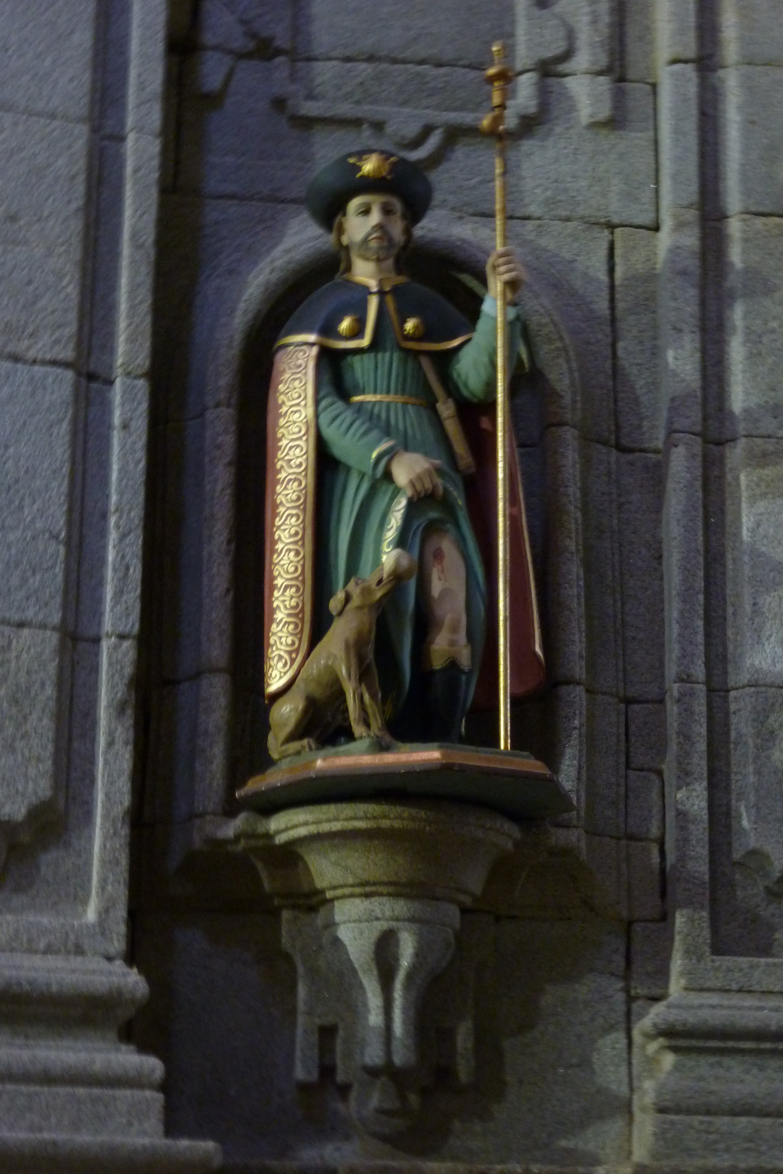 Kirche des Klosters Santa María in Armenteira, Skulptur des hl. Rochus